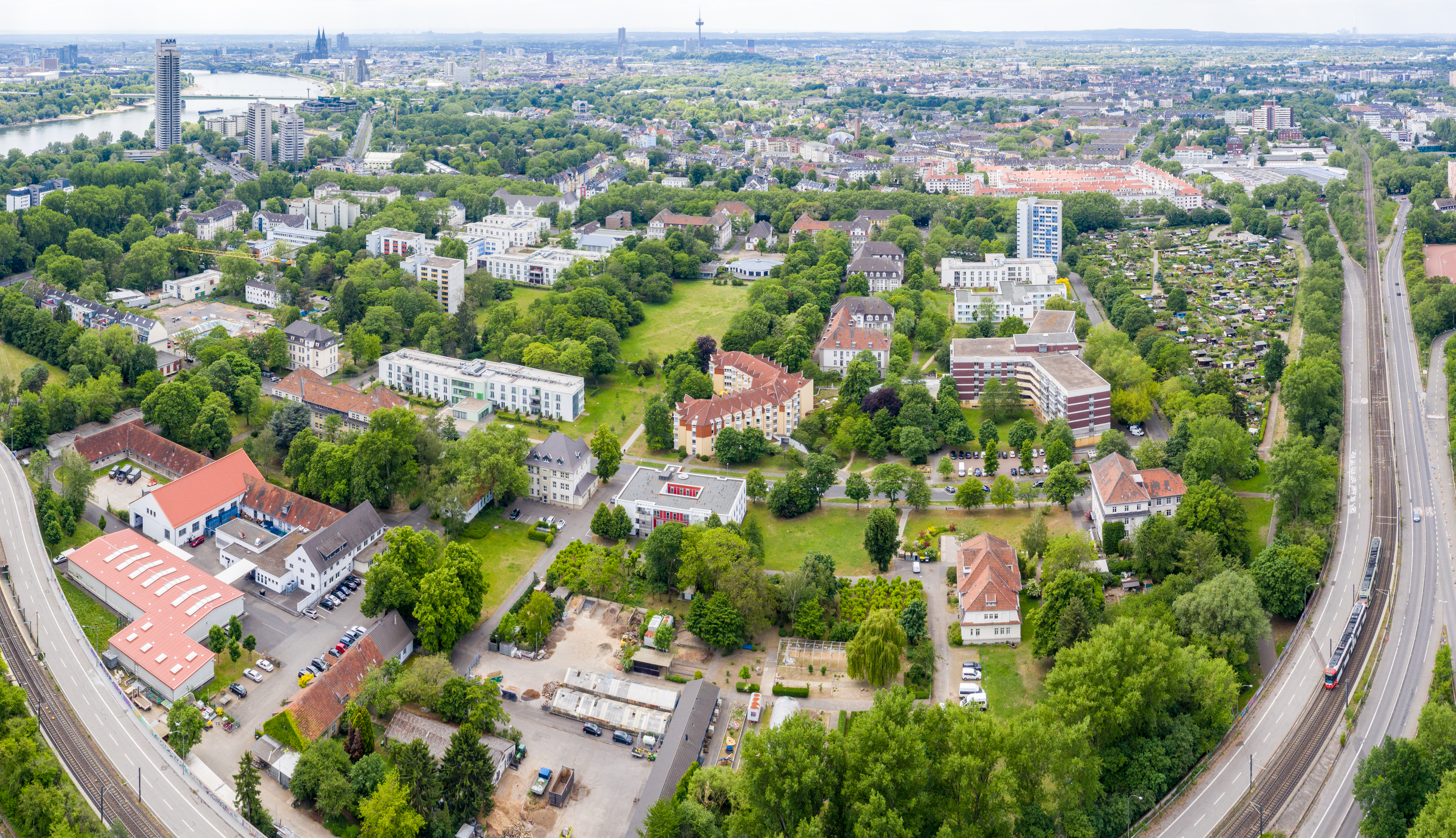 Riehler Heimstätten, Köln - Luftaufnahme. Flughöhe: 150 m mit Genehmigung der Bezirksregierung Köln und Freigabe durch die Deutsche Flugsicherung Köln. Standort der Drohne: Über dem Busparkplatz Kuhweg mit Genehmigung der Stadt Köln